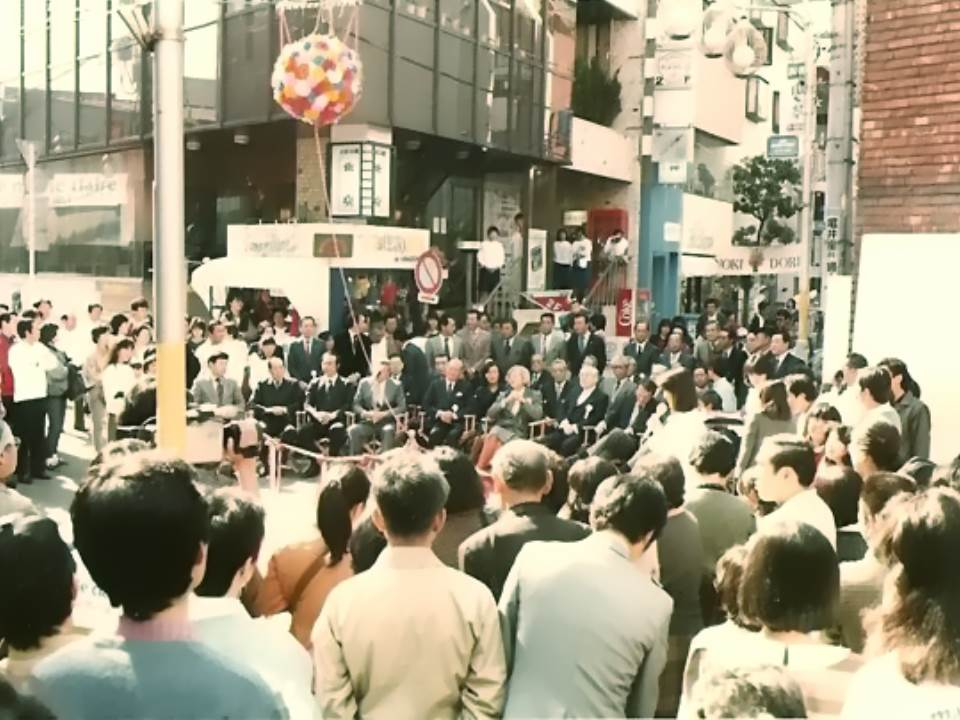 マリクレール通りオープニング模様テープカット前の集合風景（自由が丘とうきょう前、1982年11月3火）